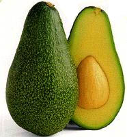 Bacon-Avocado